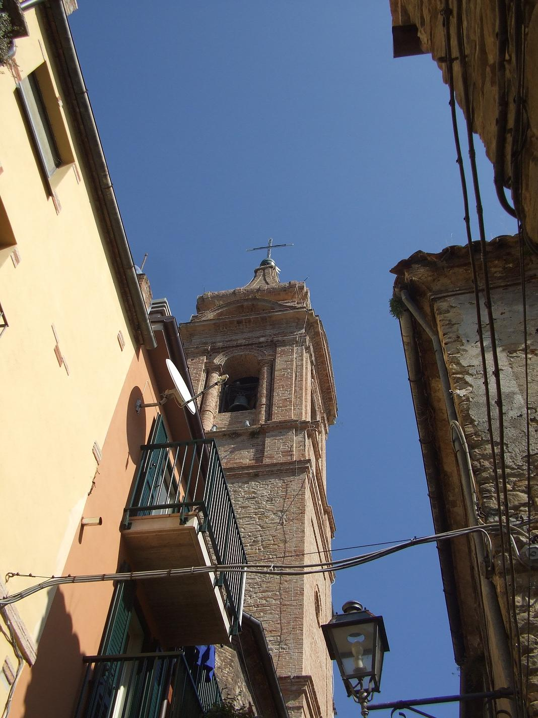 Campanile di Bisenti facciata ovest (lato campana mezzana)